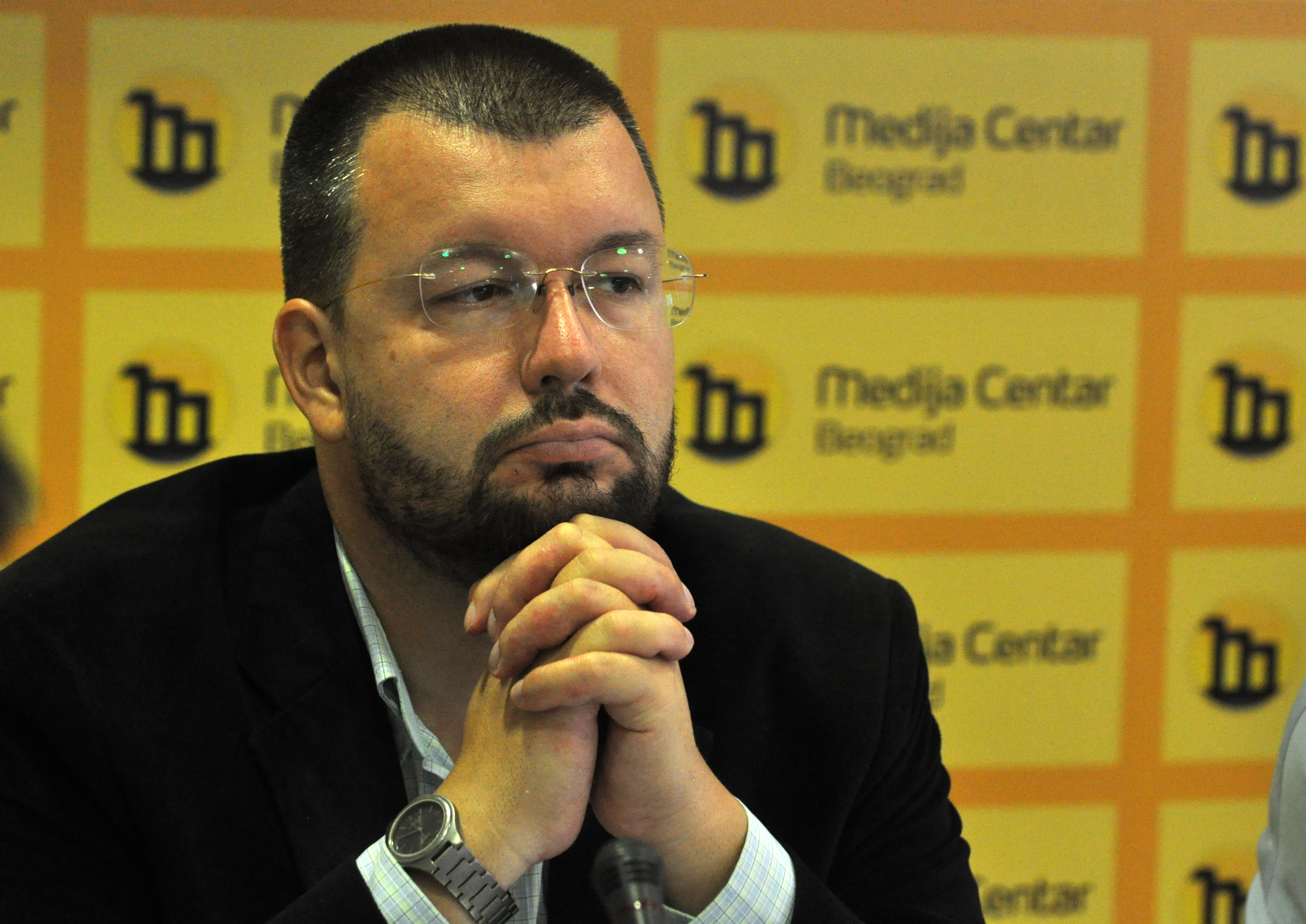 Čedomir Antić, srpski istoričar